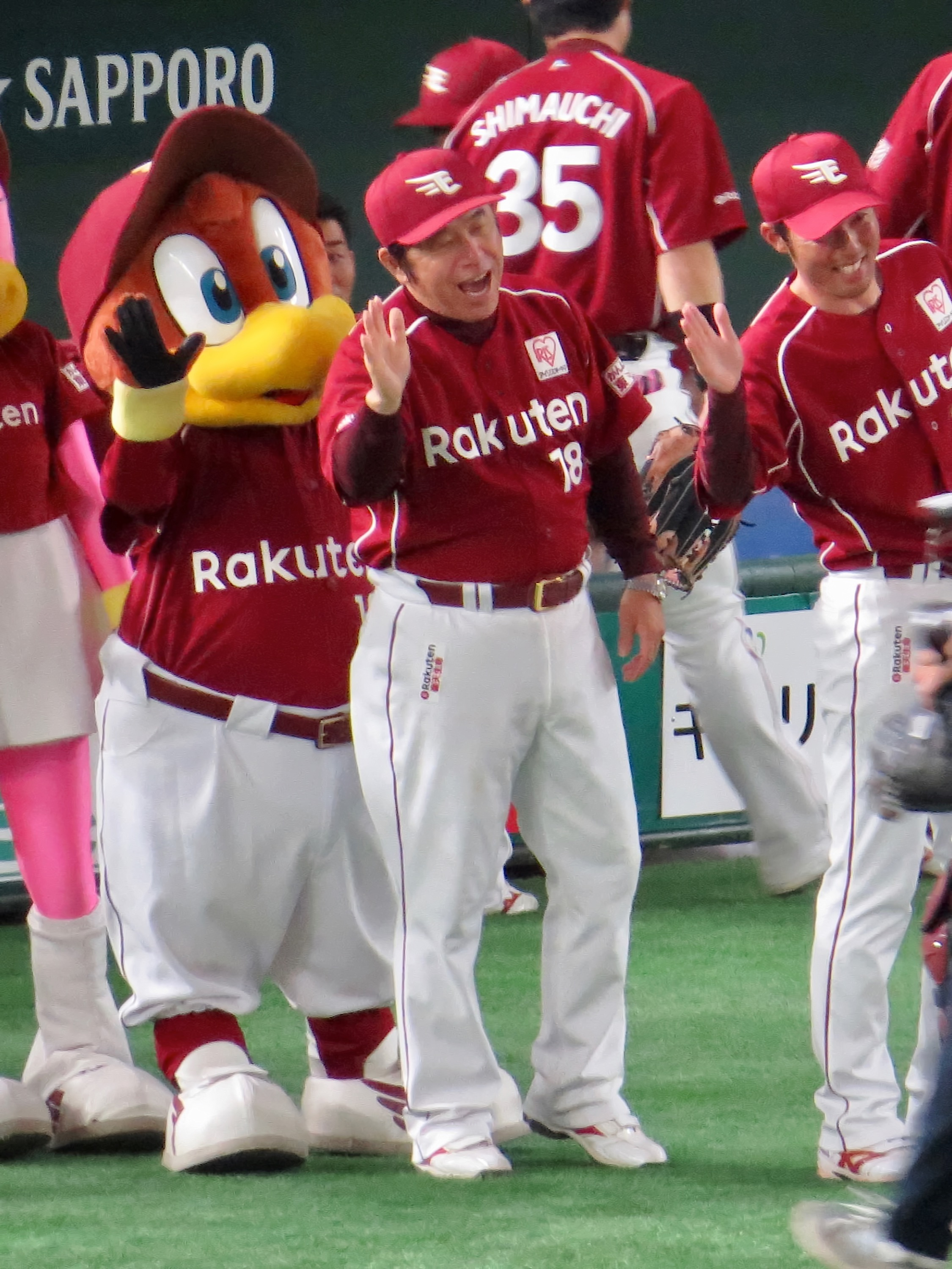 東北楽天ゴールデンイーグルスコーチの立石充男。東京ドームにて。